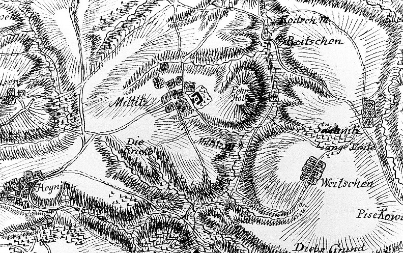 Original image description from the Deutsche Fotothek Triebischtal-Miltitz. Ausschnitt aus: Karte von einem Teil des Kurfürstentums Sachsen, Petri, nach 1759 (Sign.: VII 63)